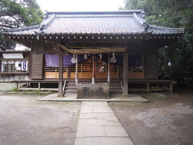 習志野市にある大原大宮神社の画像です。